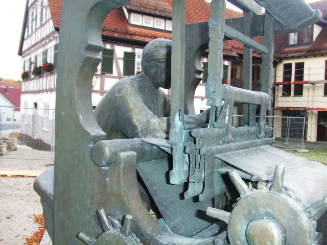 Brunnen mit Figuren eines Ritters und eines Webers in Niederstotzingen Weber